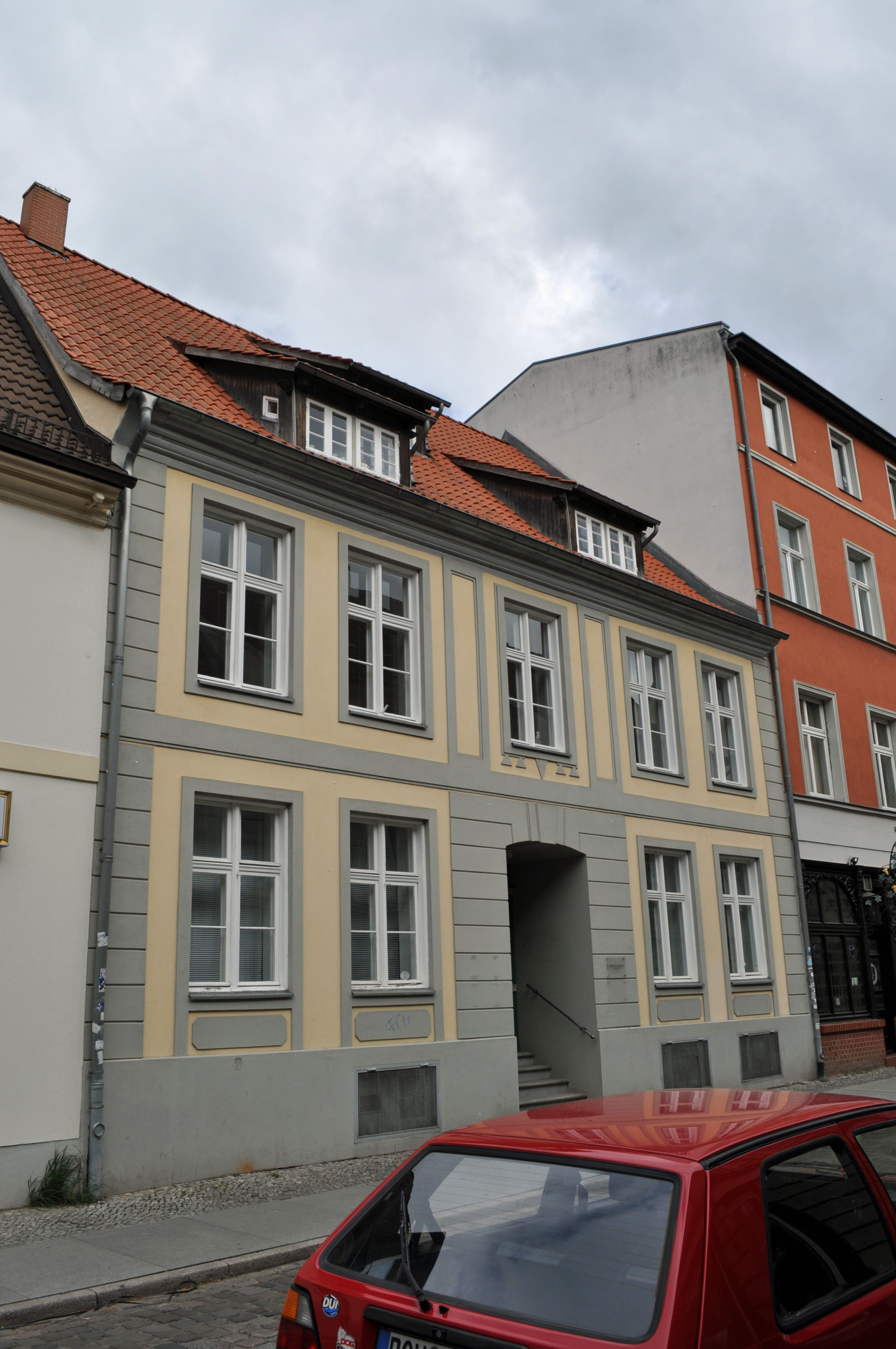 Gebäude in Stralsund, siehe Dateiname